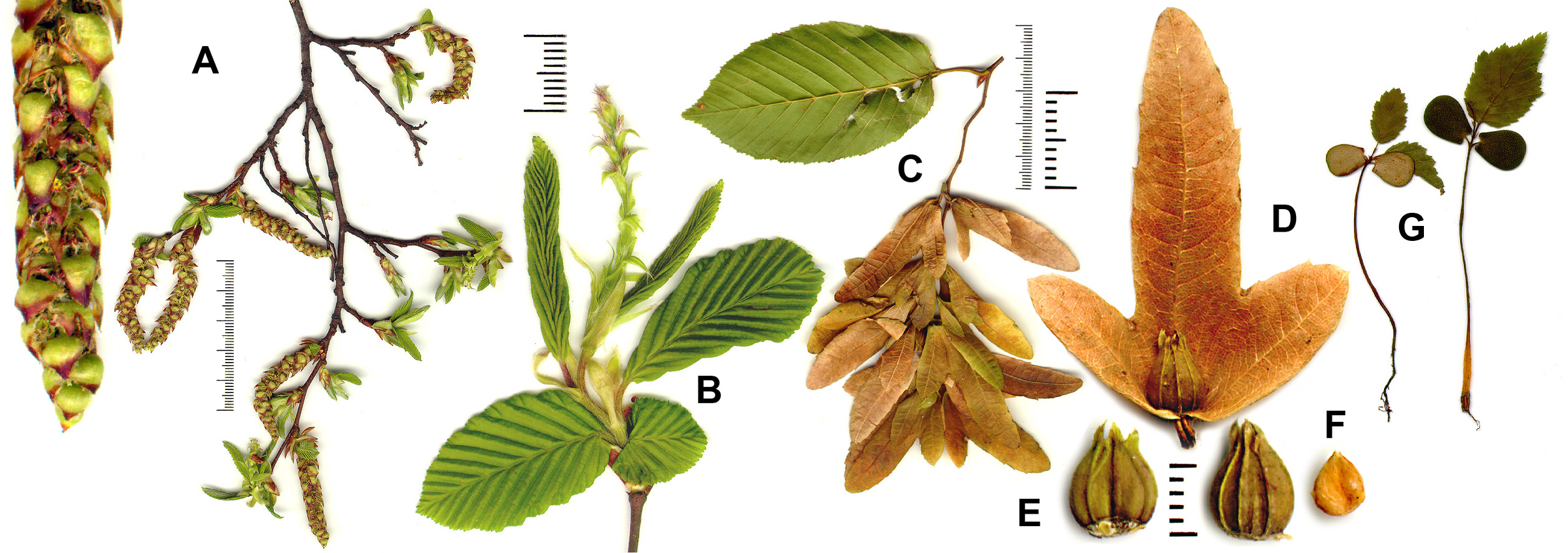 Carpinus betulus: A-мушке ресе, B-женске ресе, C-скупине плодова, D-орашица са приперком, E-орашица, F-семе, G-клијавци (аутор: Михаило Грбић).